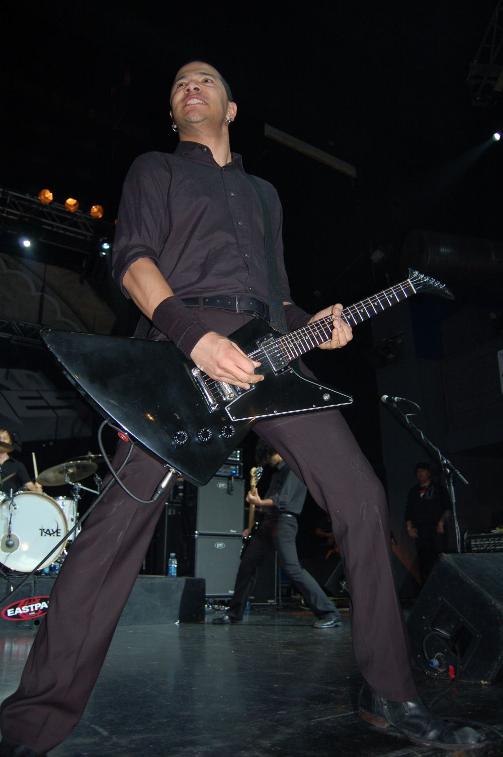 Danko Jones